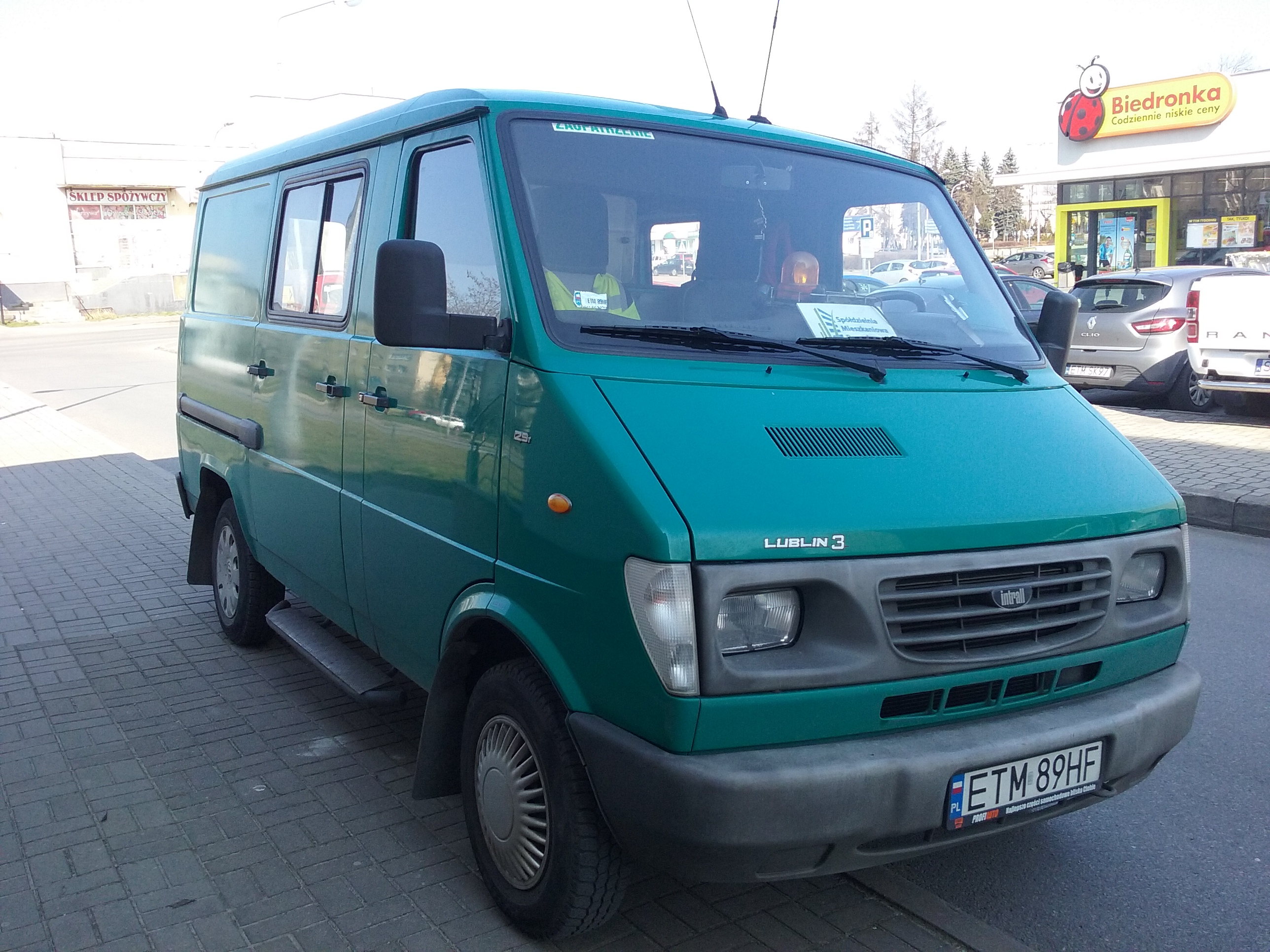 Lublin jako pojazd serwisowy największej spółdzielni mieszkaniowej w Tomaszowie Mazowieckim w woj. łódzkim – SM „Przodownik”